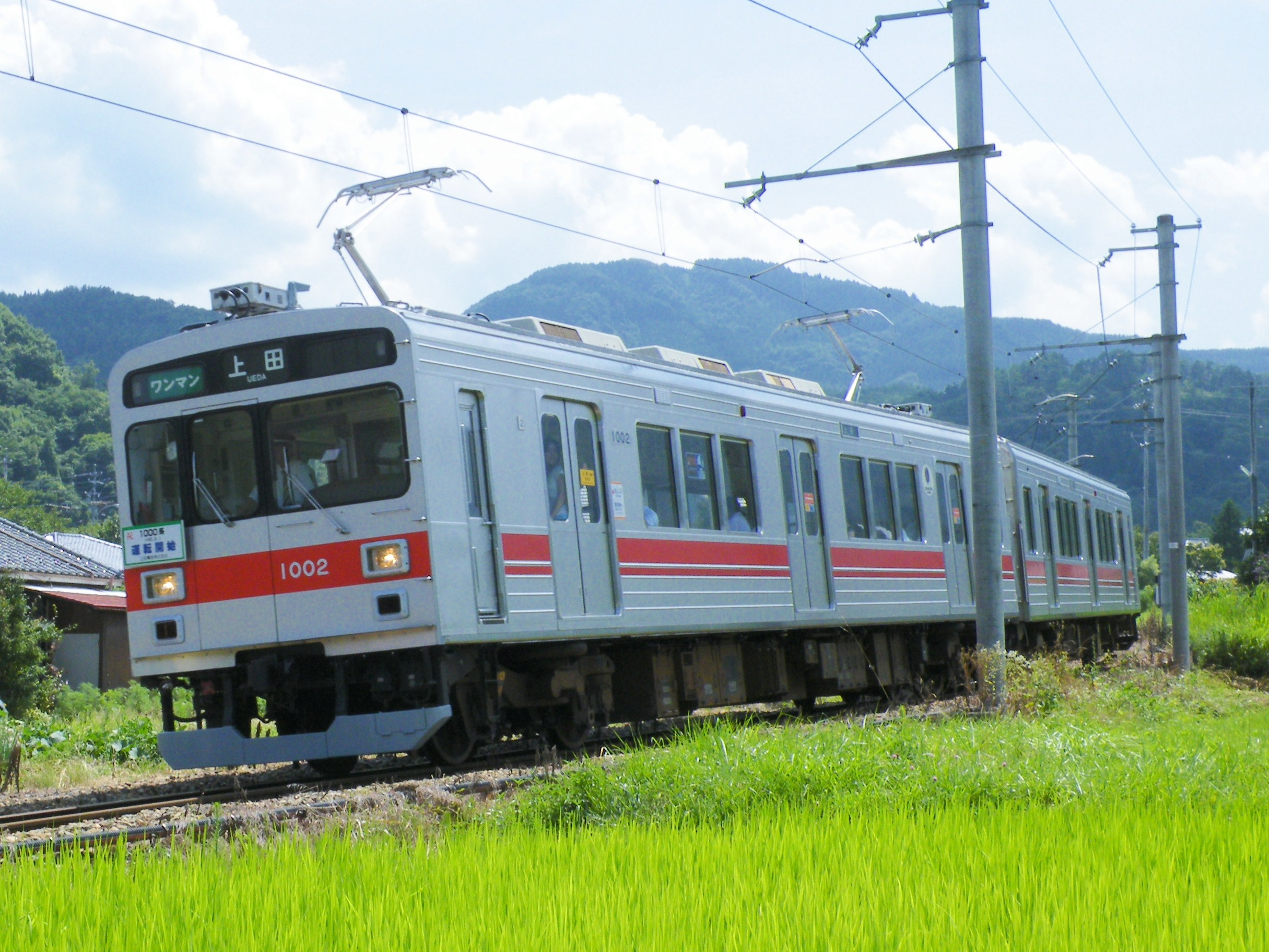 運行初日の上田電鉄1000系電車、別所温泉～八木沢